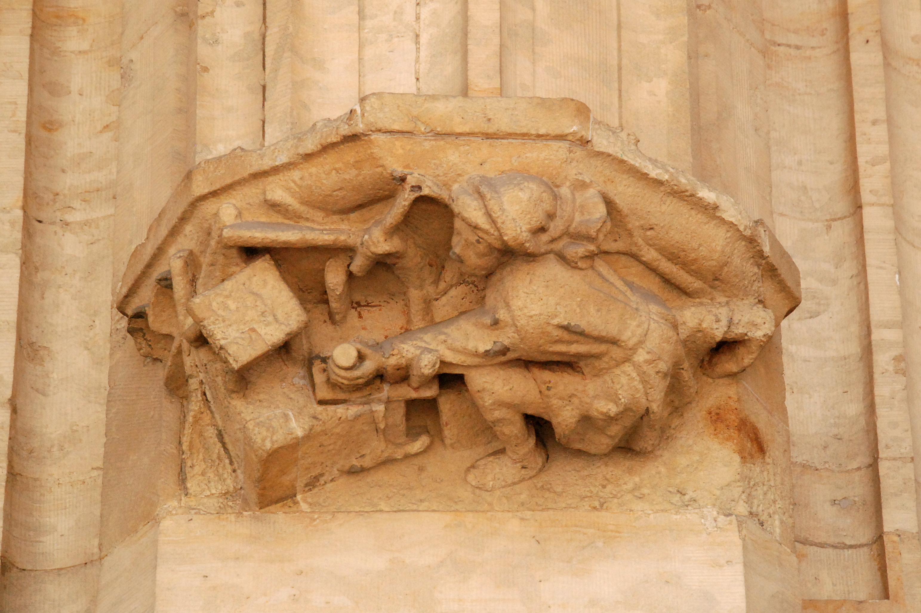 Belgique - Bruxelles - Grand-Place - Hôtel de Ville - Maison de l'Estrapade (Scupstoel)